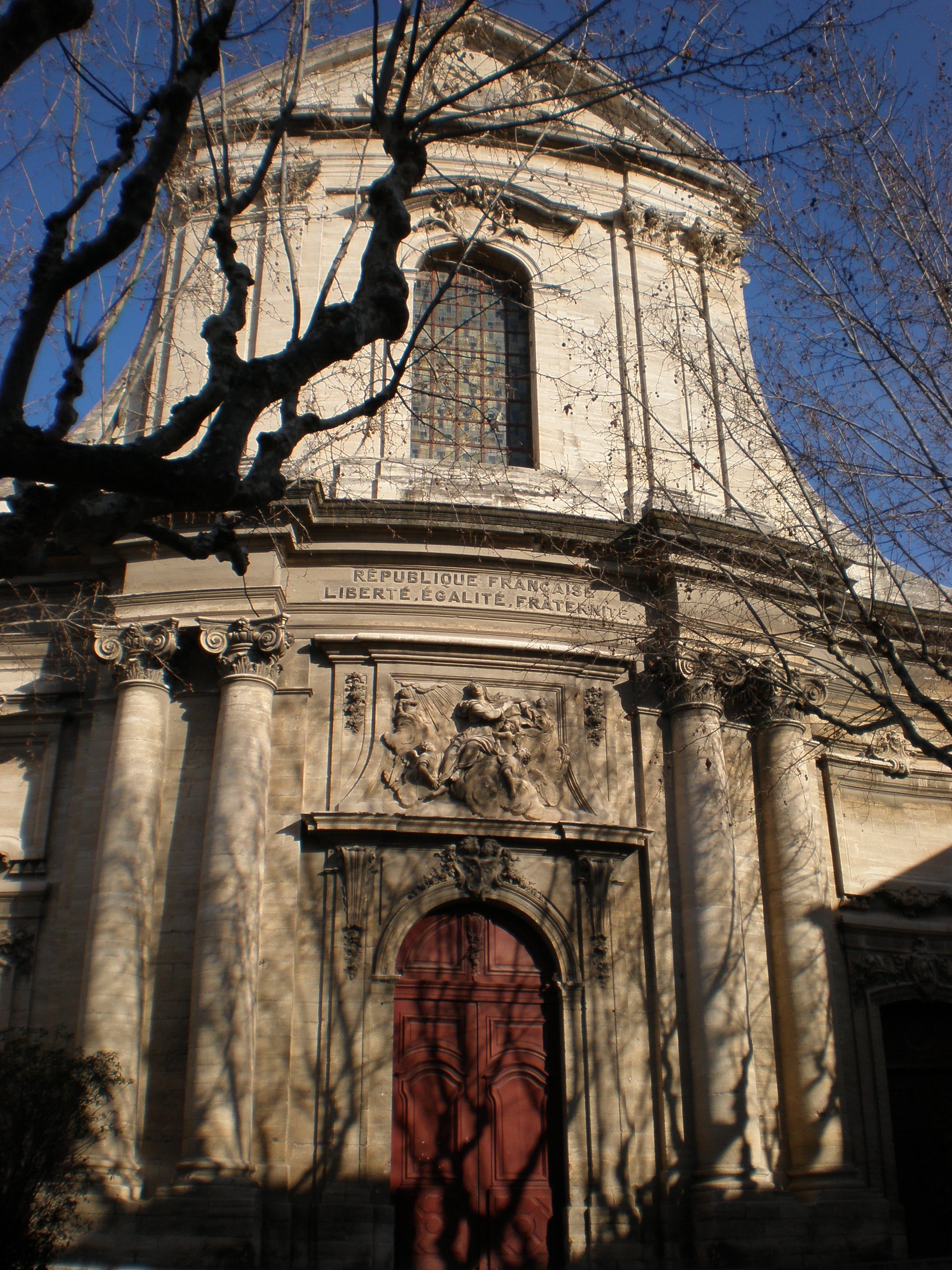 Église collégiale Notre-Dame-des-Pommiers de Beaucaire (Gard), XVIIIème siècle